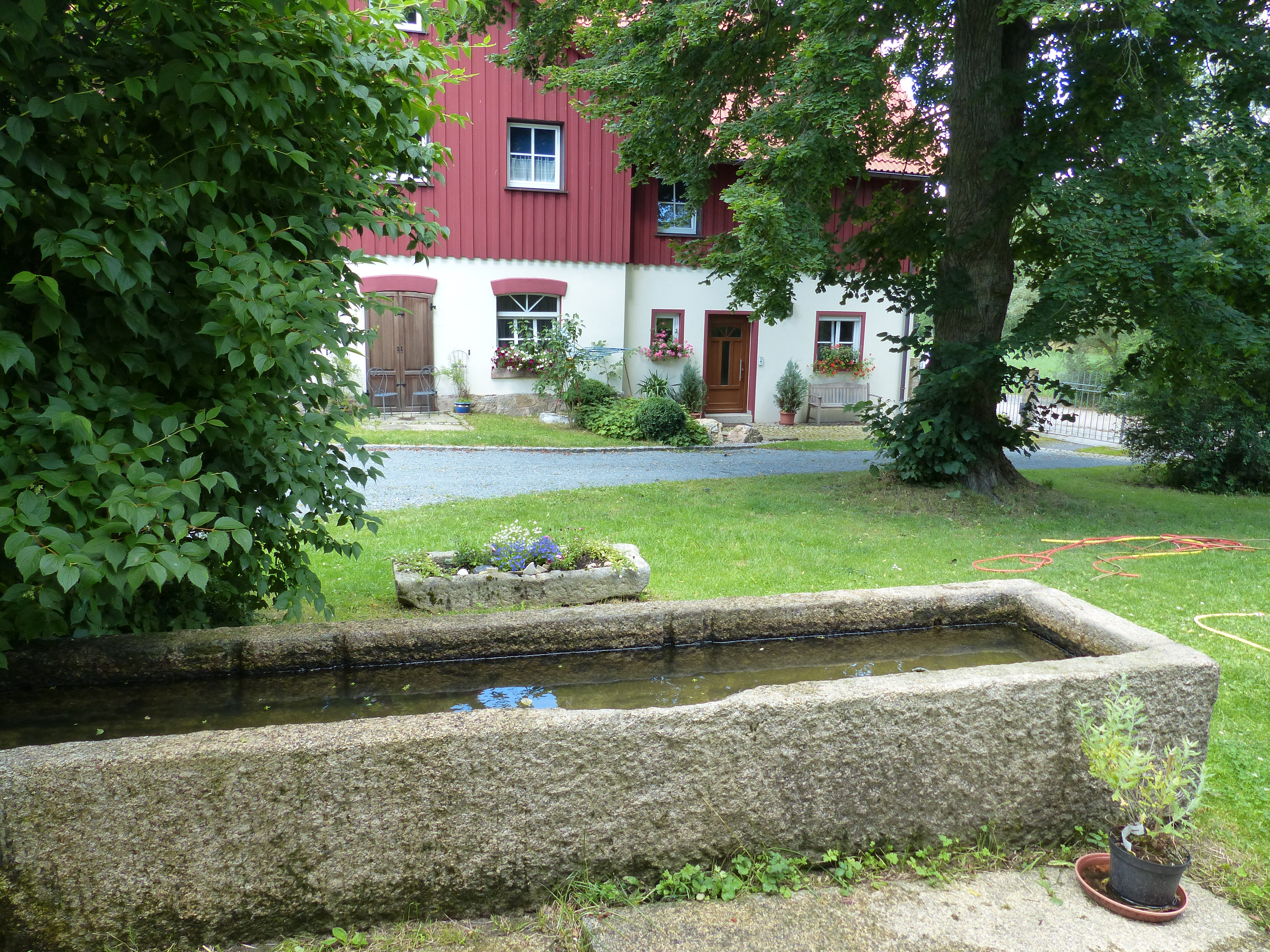 Brunnentrog in Birkenbühl, Ortsteil der Stadt Schwarzenbach an der Saale